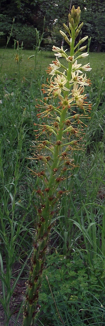 Eremurus thiodanthus habitus